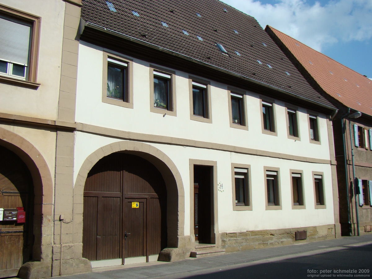 Historisches Gebäude Adelshofener Str. 14 in Eppingen